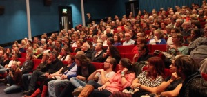 Séance cinéma